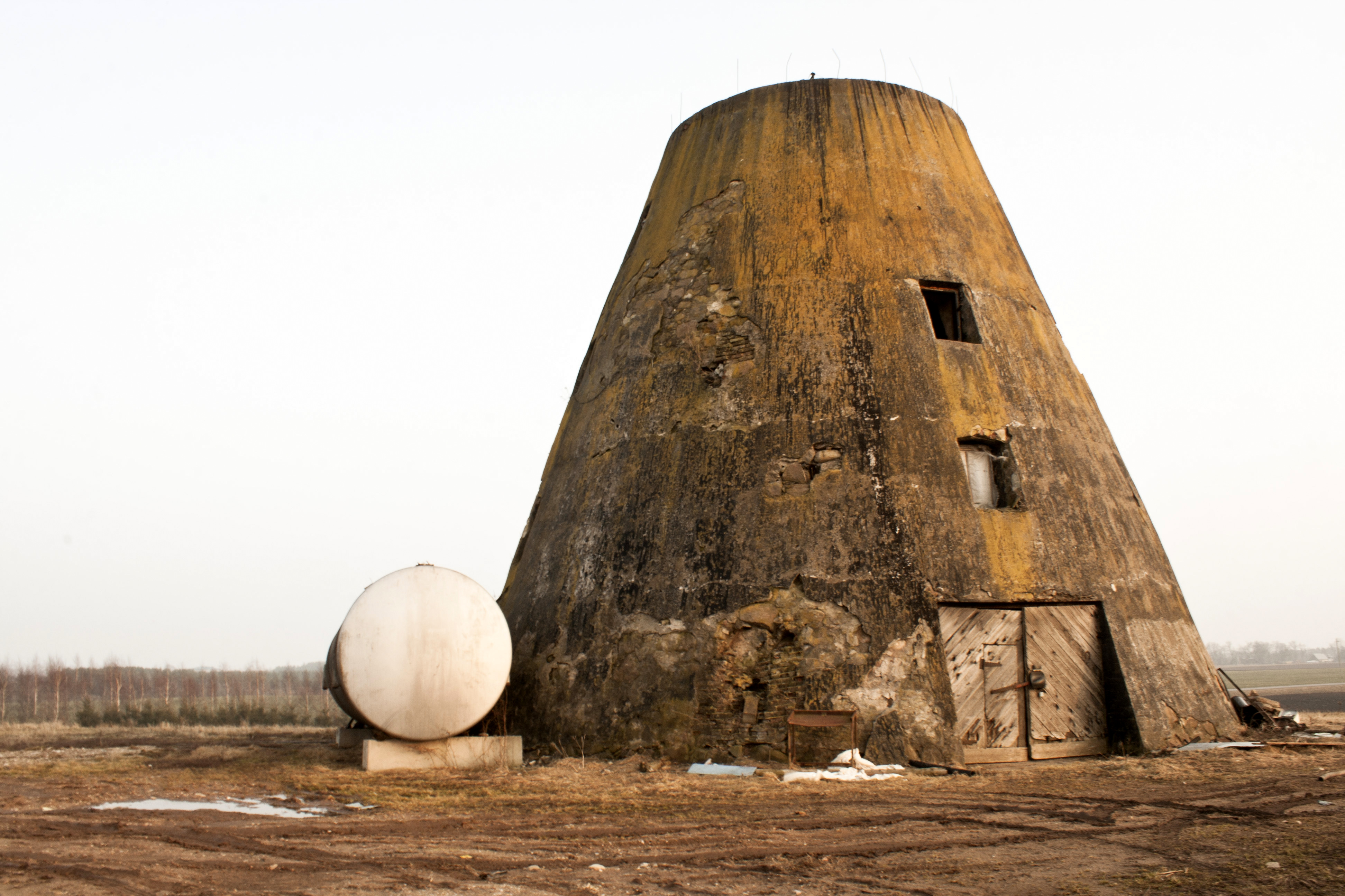 Lakštingalos windmill